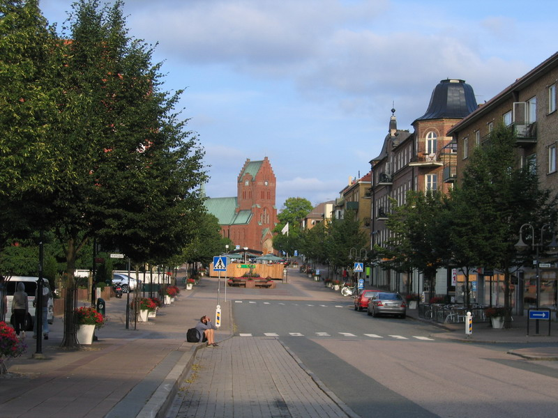 Hässleholm Center,sweden